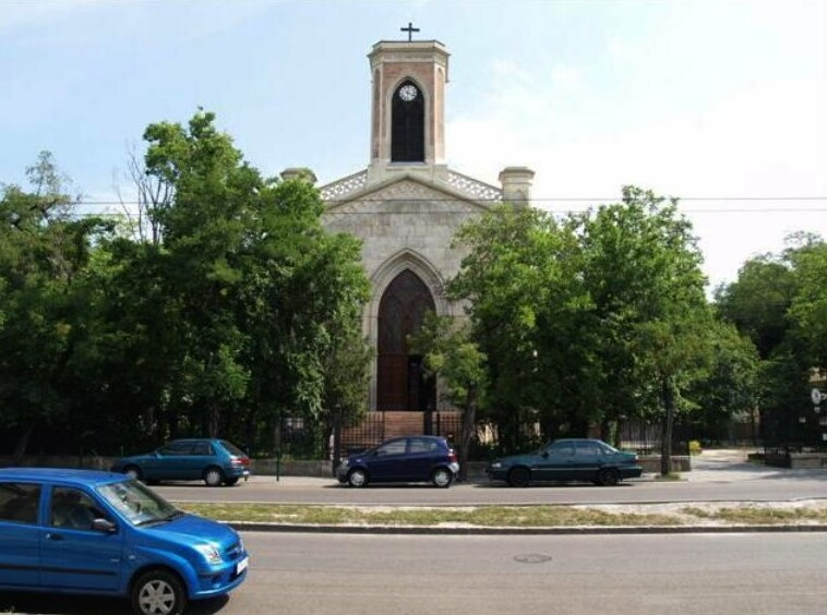 Budapest-Zugló. Hermina kápolna 1843-54. Épült Hild József tervei szerint